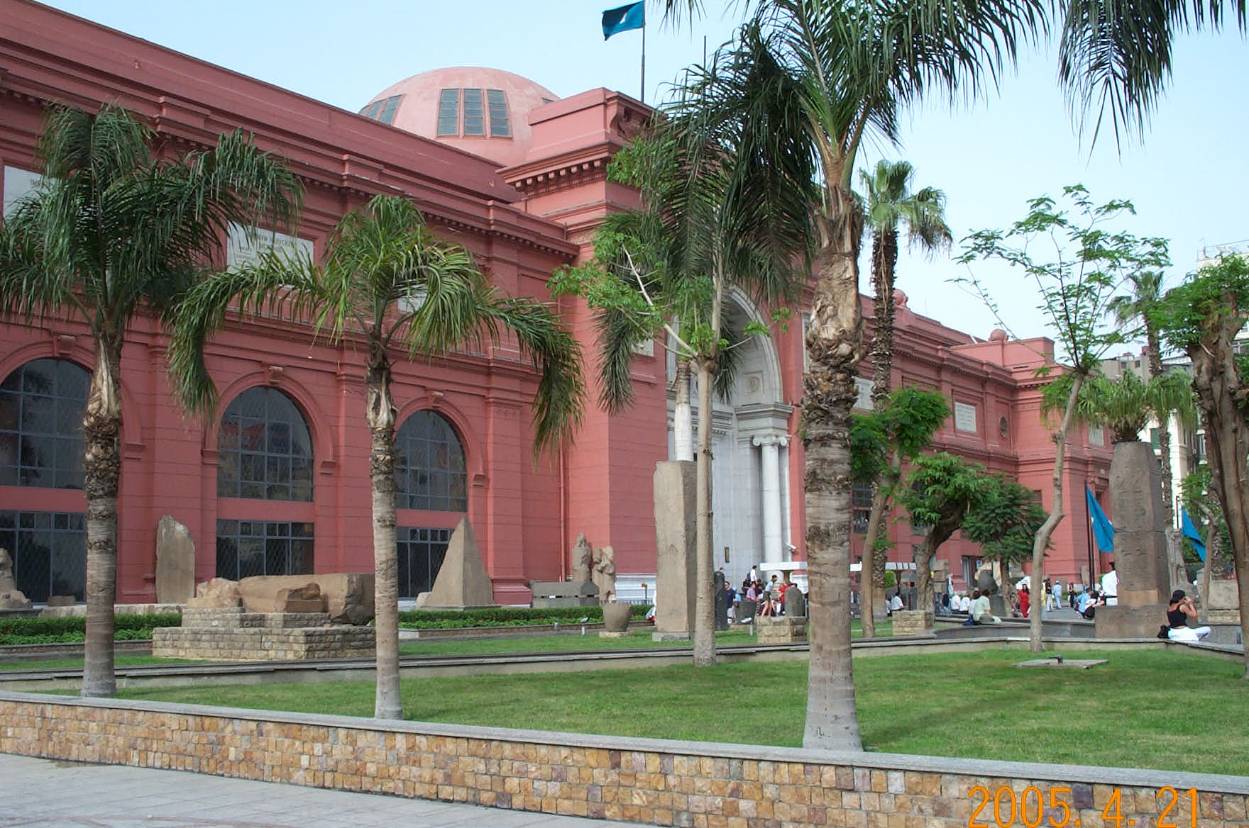 Az Egyiptomi Múzeum kertje Kairóban.